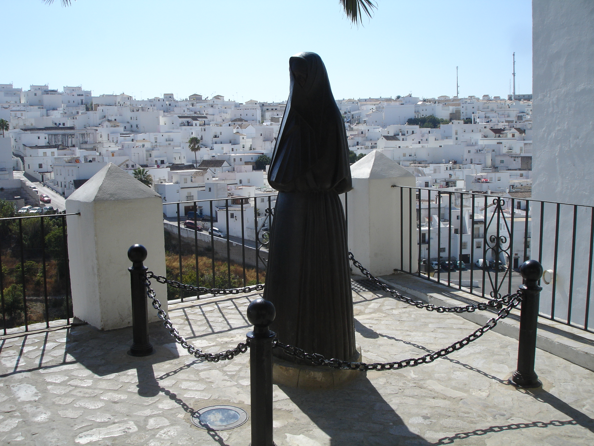 Vejer de la Frontera. Andalusia (Spain)